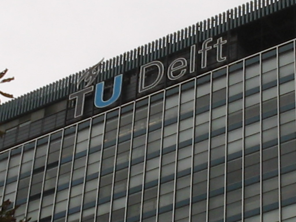 TU Delft logo op gebouw elektrotechniek